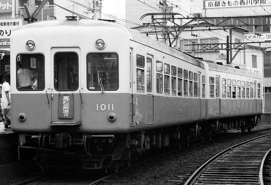 高松琴平電鉄 1011+1012